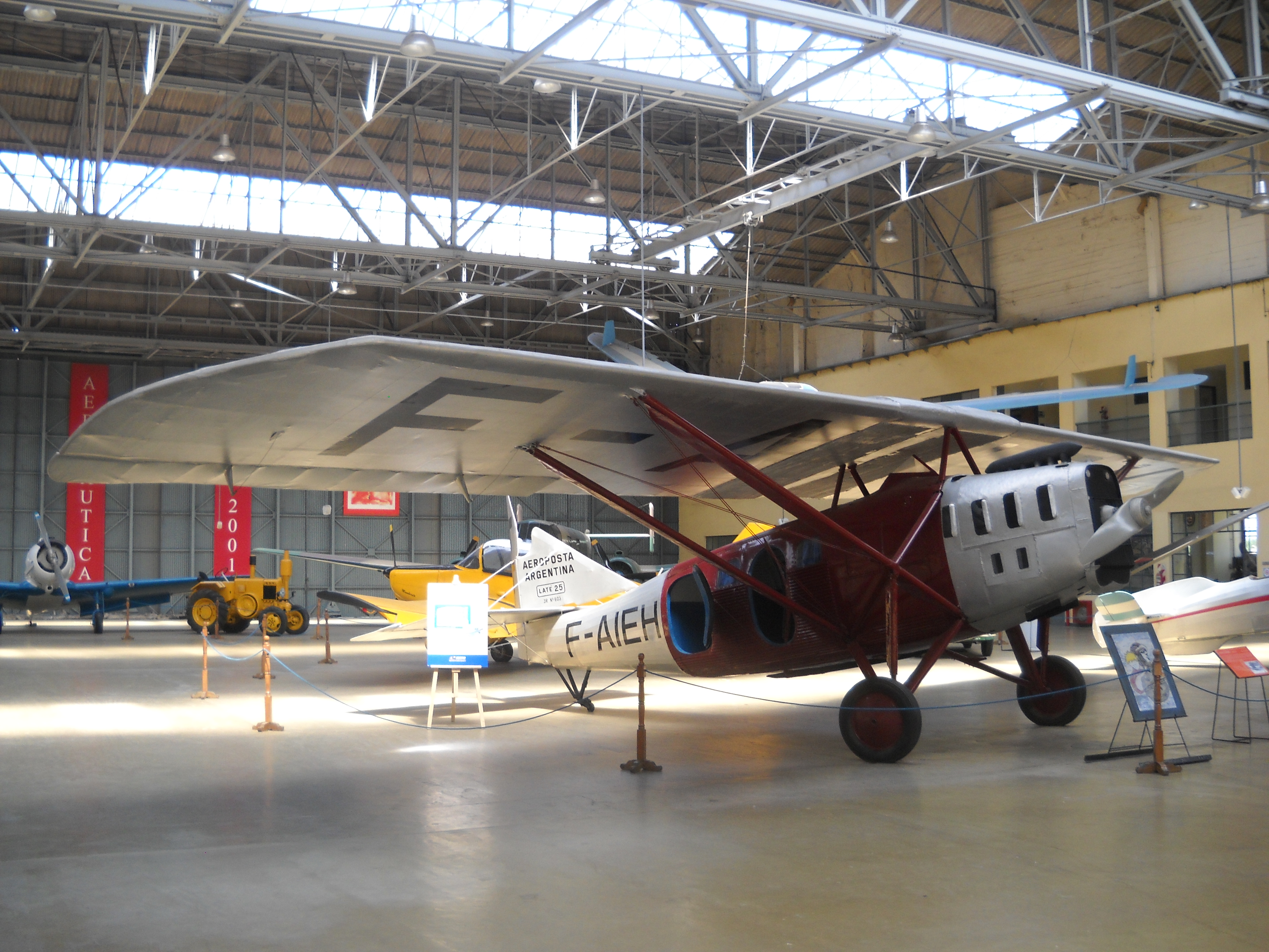 Latecoere 25